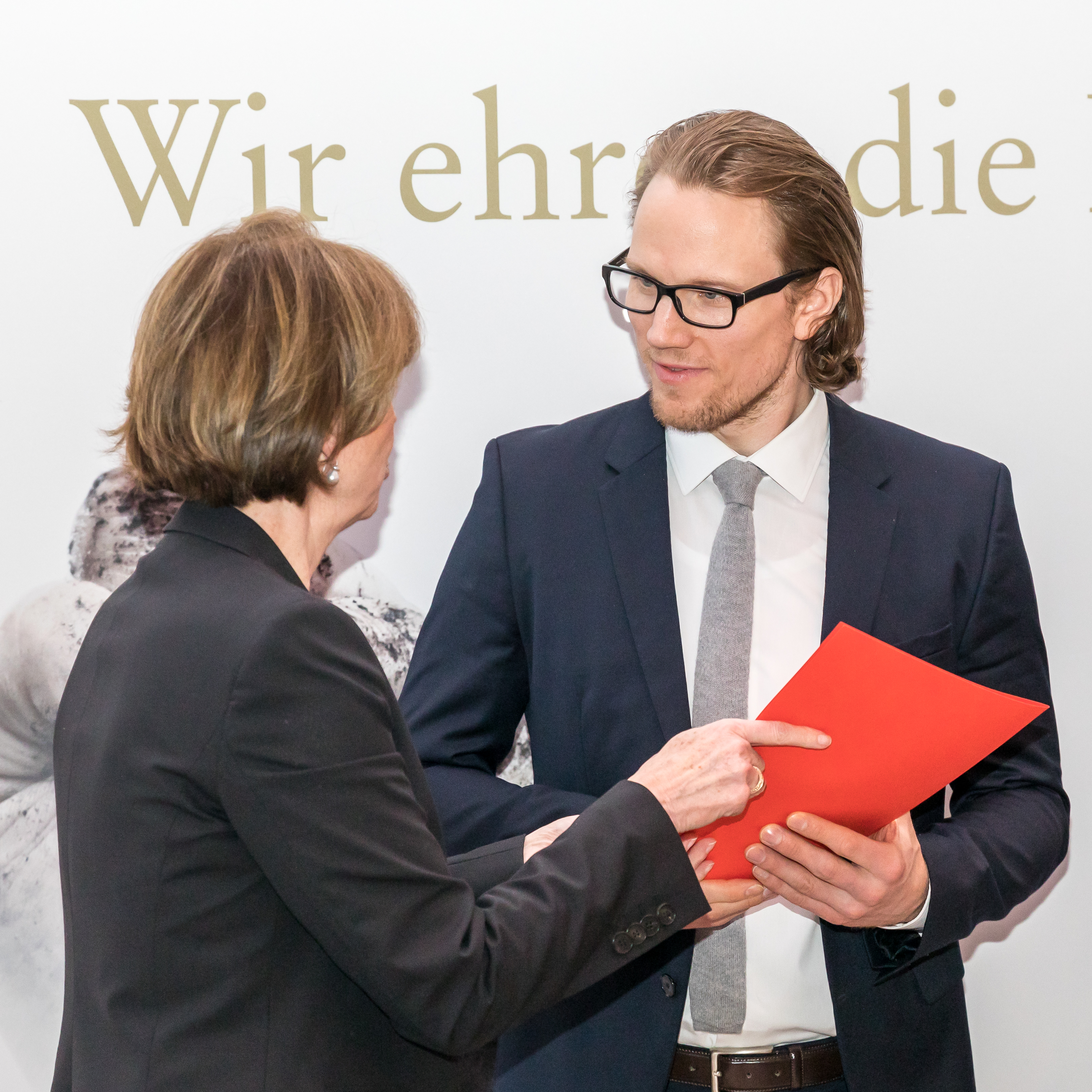 Empfang Medaillengewinner XXIII. Olympische Winterspiele im Rathaus Köln